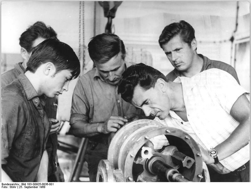 Zentralbild Stöhr 25.9.1968 Wilhelm-Pieck-Stadt Guben. Nicht nur ein Meister seines Faches sondern auch ein Sachverständiger, Helfer und Pädagoge in wehrpolitischen Fragen ist der Oberfeldwebel d.R. Harald Röhr (rechts vorn). Als Meister in der Zentralwerkstatt des Chemiefaserkombinates Wilhelm-Pieck-Stadt Guben sieht er einen besonderen Schwerpunkt seiner Arbeit in der Erziehung der Jugend zu bewußten Kämpfen für die Sache des Sozialismus. Neben der beruflichen Arbeit hilft er den Jugendlichen, sich militärische Kenntnisse und Fähigkeiten anzueignen, um den Schutz unseres Staates zu gewährleisten. Für seine hervorragenden Leistungen erhielt Harald Röhr bisher 15 staatliche Auszeichnungen und wurde mit dem Titel "Held der Arbeit" geehrt. Unser Bild zeigt Harald Röhr zusammen mit dem Lehrling Karl-Heinz Fechner, dem Reparaturschlosser Unterfeldwebel d. R. Dieter Kienel und dem Gefreiten d. R. Siegfried Conrad- (v.l.n.r.) bei der Arabei an einem Vakummgebläse.